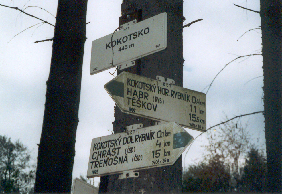 Česky: Kokotsko 2002.